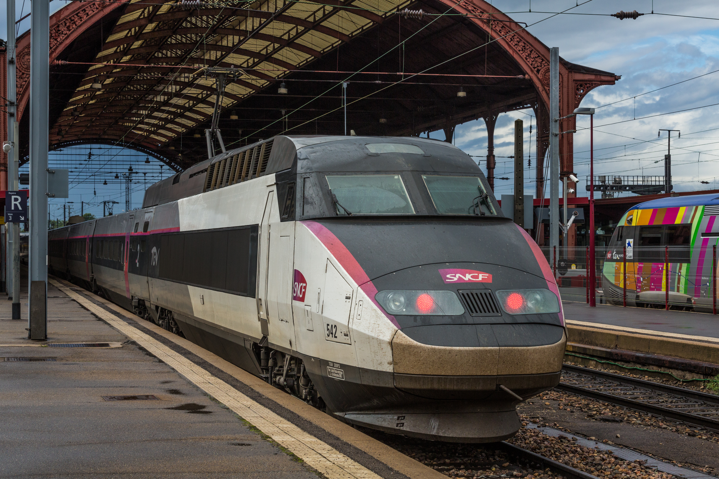 Strasbourg Gare Centrale voies 2_3 rames TGV